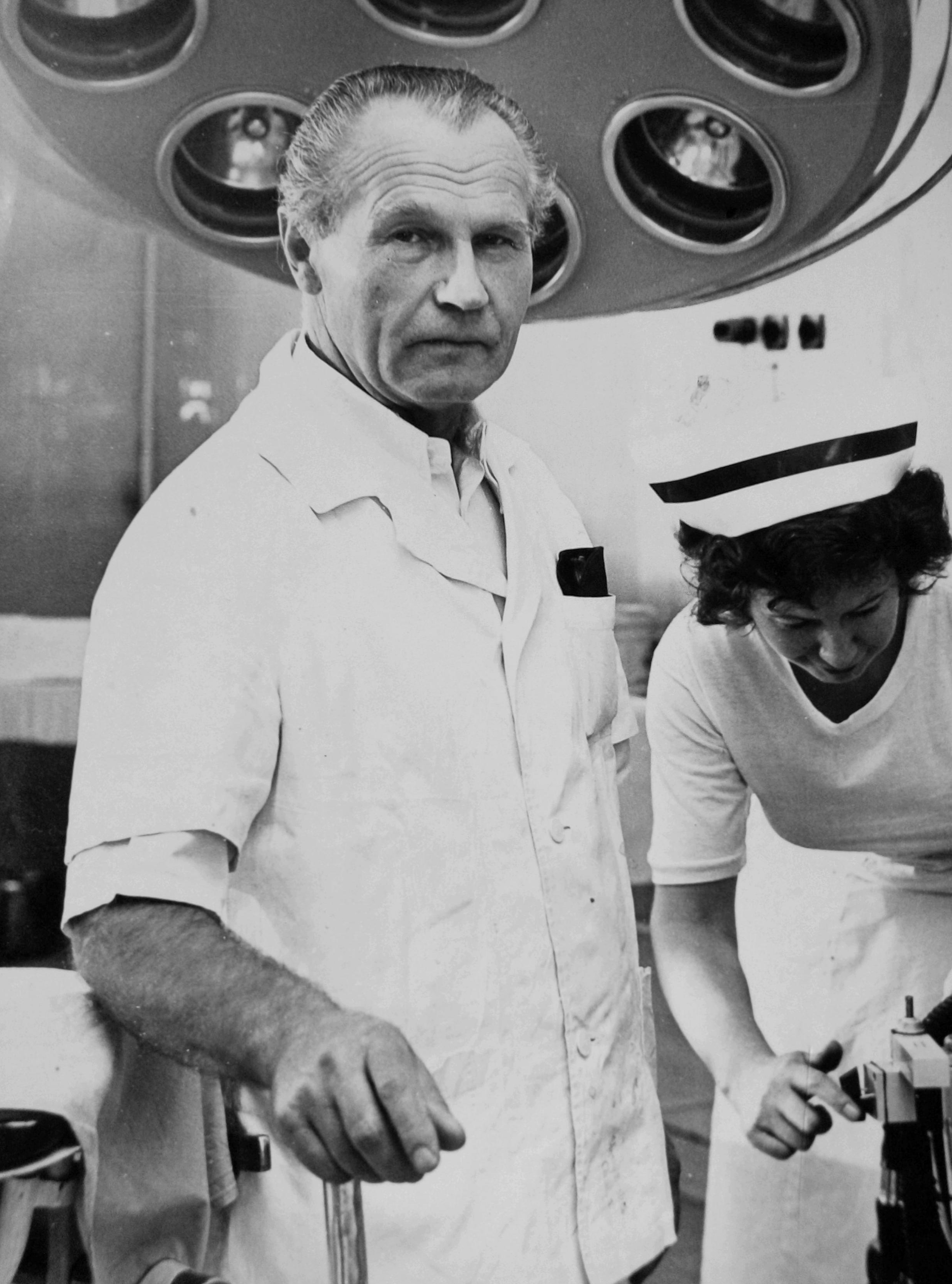 Jan Jarosz w Cieszyńskim Szpitalu Śląskim.